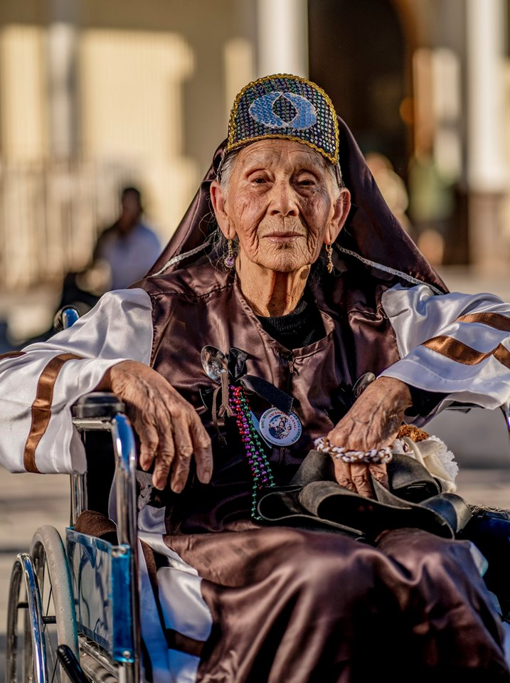 anciana cuyaca